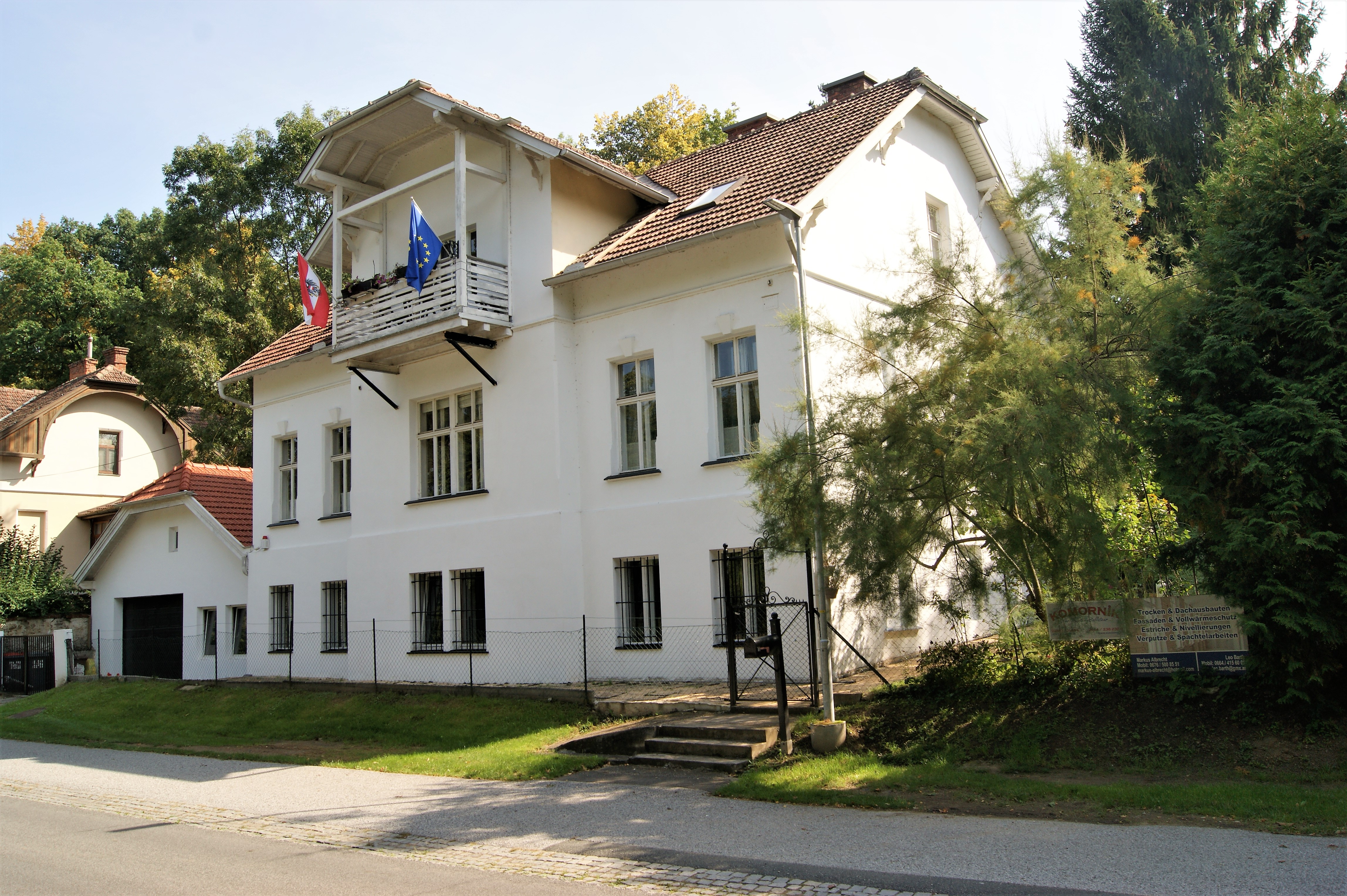 Dialog im Kamptal (Georgia Kazantzidu und Matthias Laurenz Gräff) im Atelier Gräff, Zitternberg, Gars am Kamp, Österreich